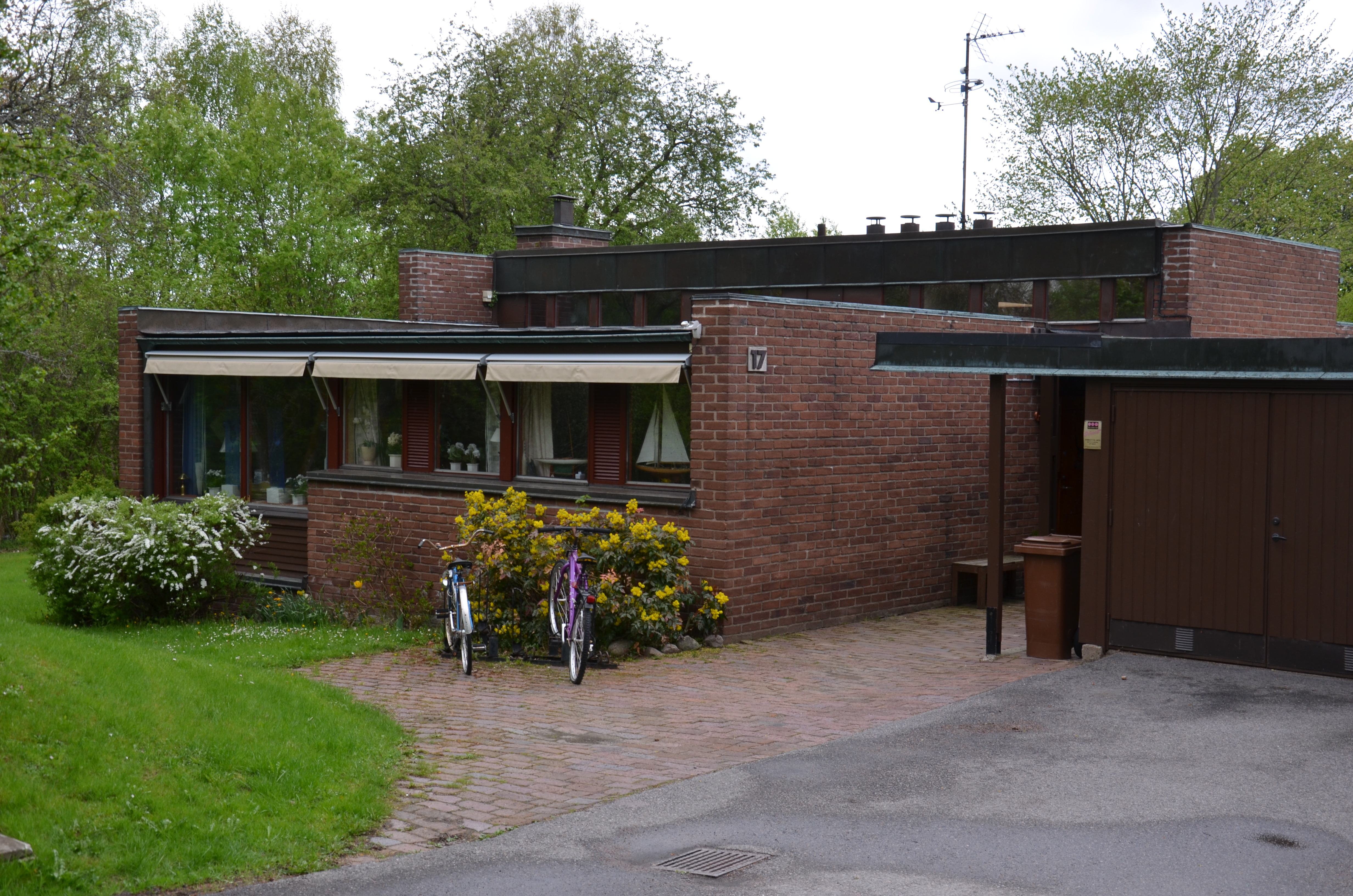 NU64 house, Nordengatan 17 in Norrköping. Architect: Lennart Kvarnström.